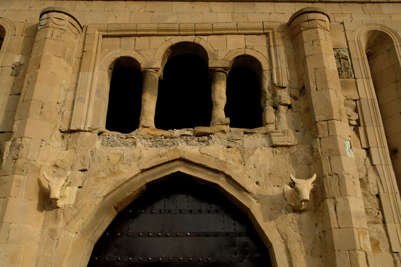 Swetizchowli-Kathedrale, Ostfassade mit Stierköpfen, Mzcheta, Georgien.